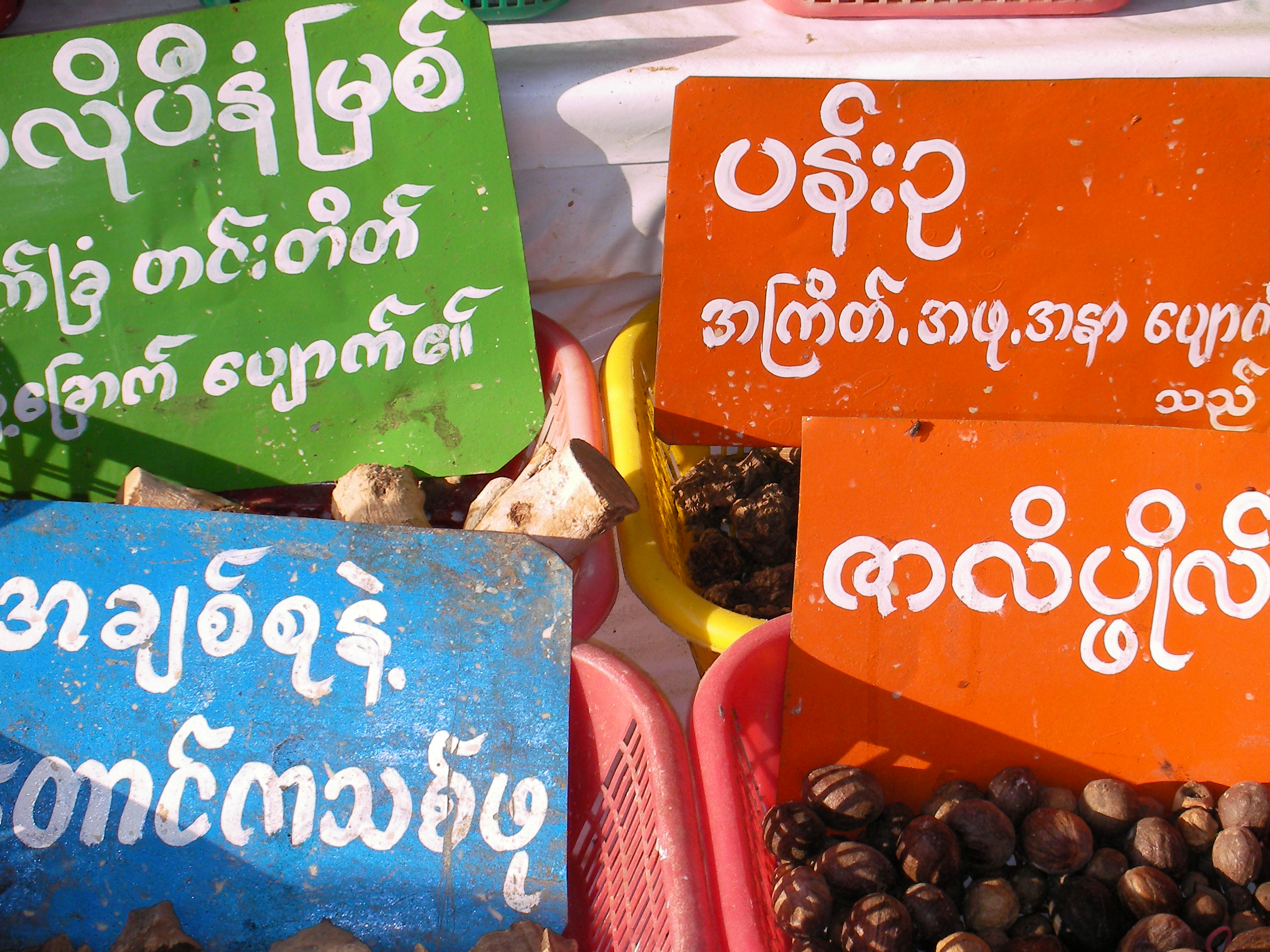 Marchands de plantes médicinales